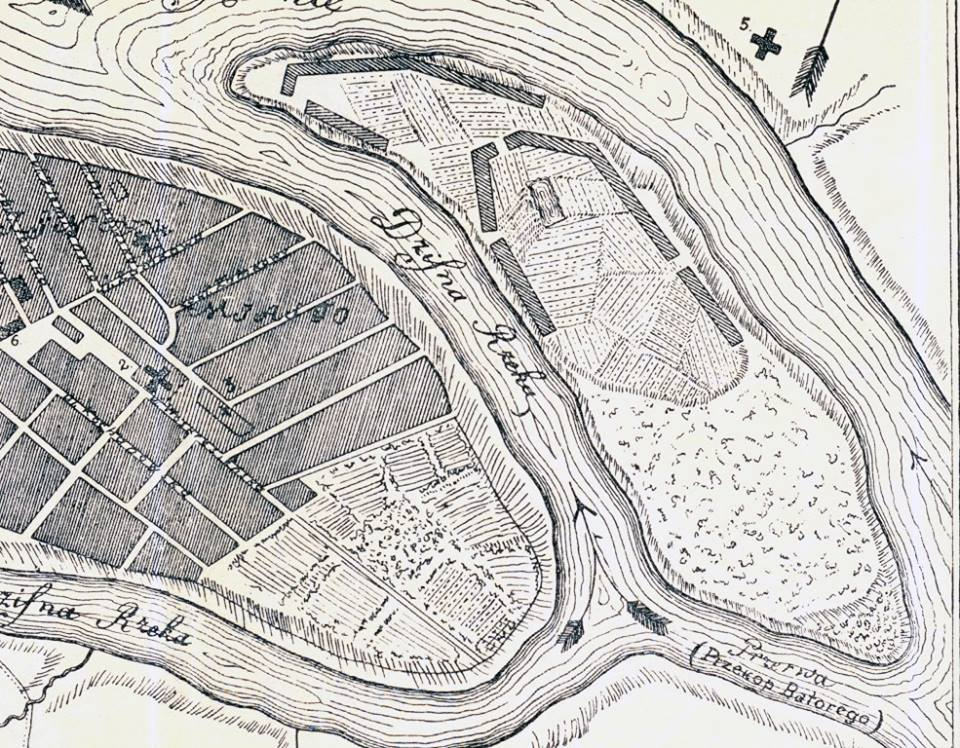 Дзісенскі замак на плане 18 ст.